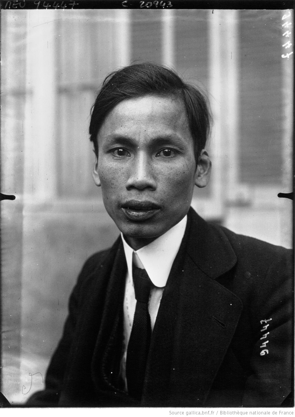 Congrès communiste de Marseille : Nguyen Aïn Nuä'C délégué indochinois